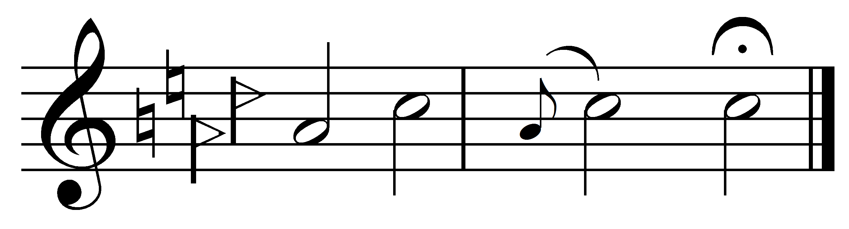 فرود مخصوص در چهارگاه دو